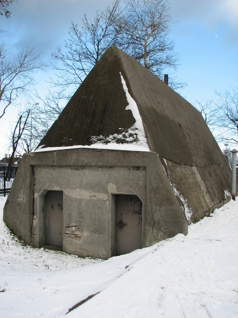 Naziemny schron przeciwlotniczy w gdyńskim porcie zbudowany dla pracowników Urzędu Morskiego w drugiej połowie lat 30. XX w. według Instrukcji Budowlanej Obrony Przeciwlotniczej Biernej z 1934 r. Spośród tego typu budowli wyróżnia się niespotykaną ostrosłupową bryłą, która w założeniu miała zapobiegać detonacji bomby lotniczej na stropie.